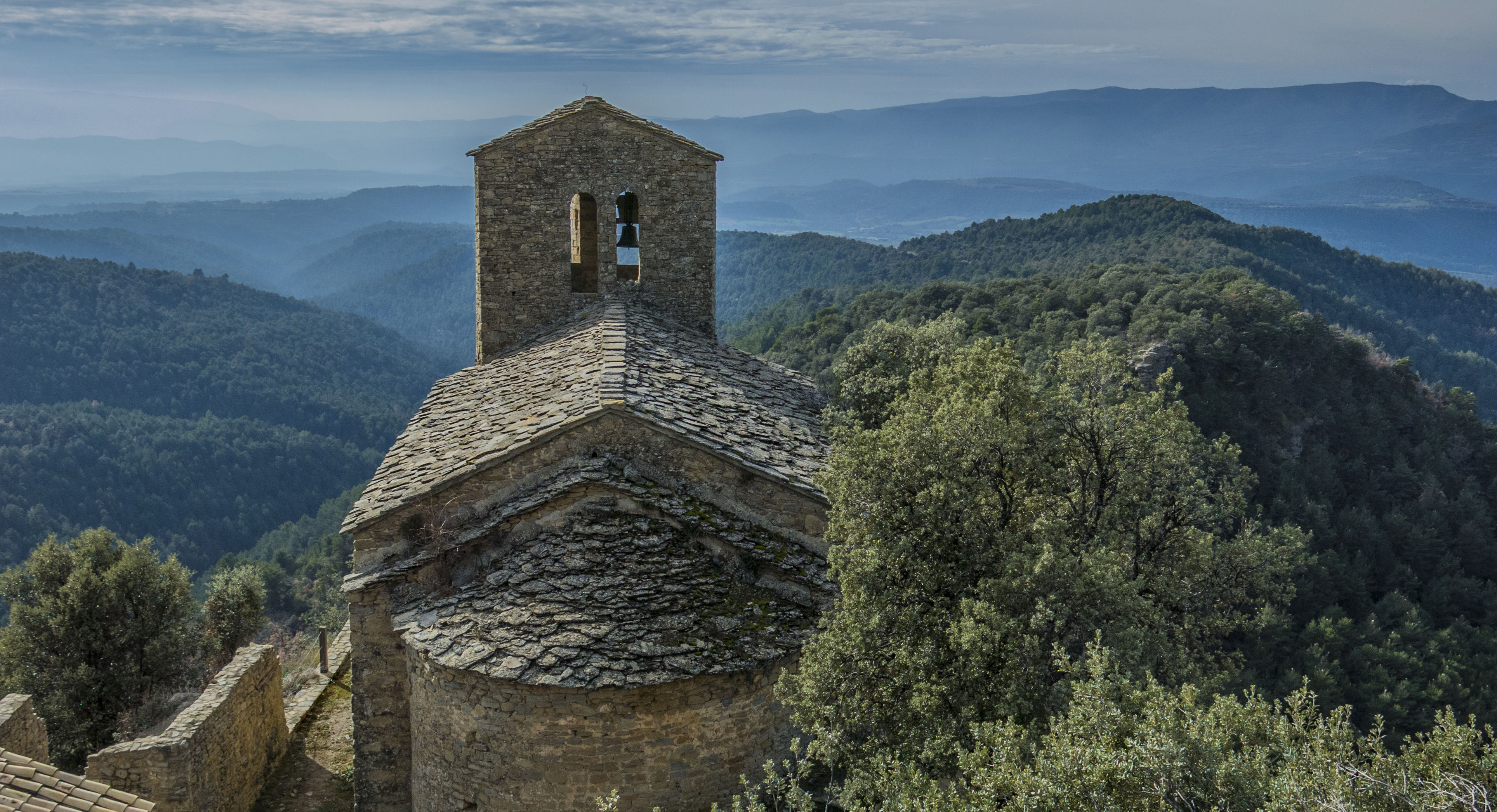 A Fontova (La Pobla de Fontova-Graus), a la comarca de la Ribagorça de l'Aragó.